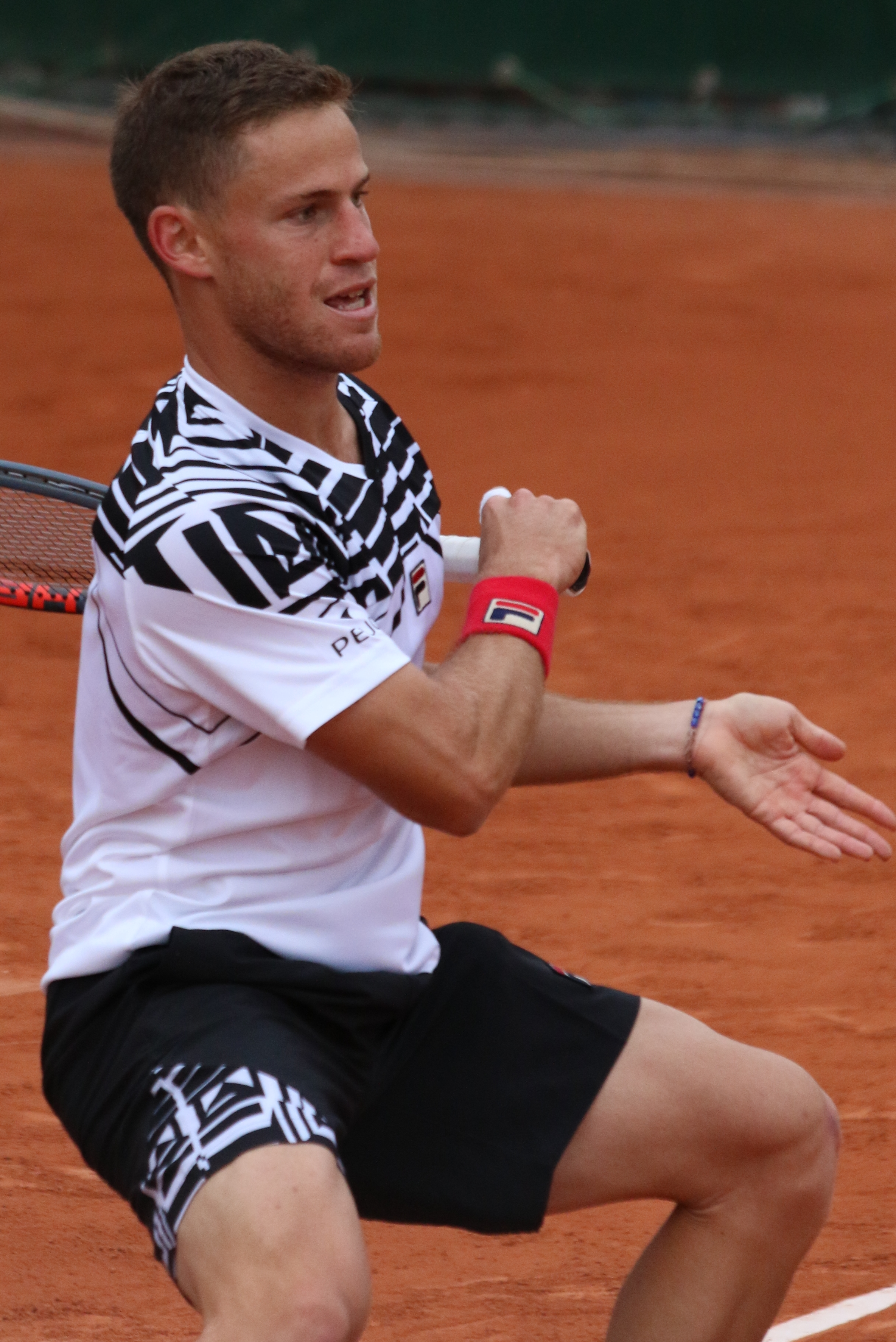 Schwartzman RG19 (1)